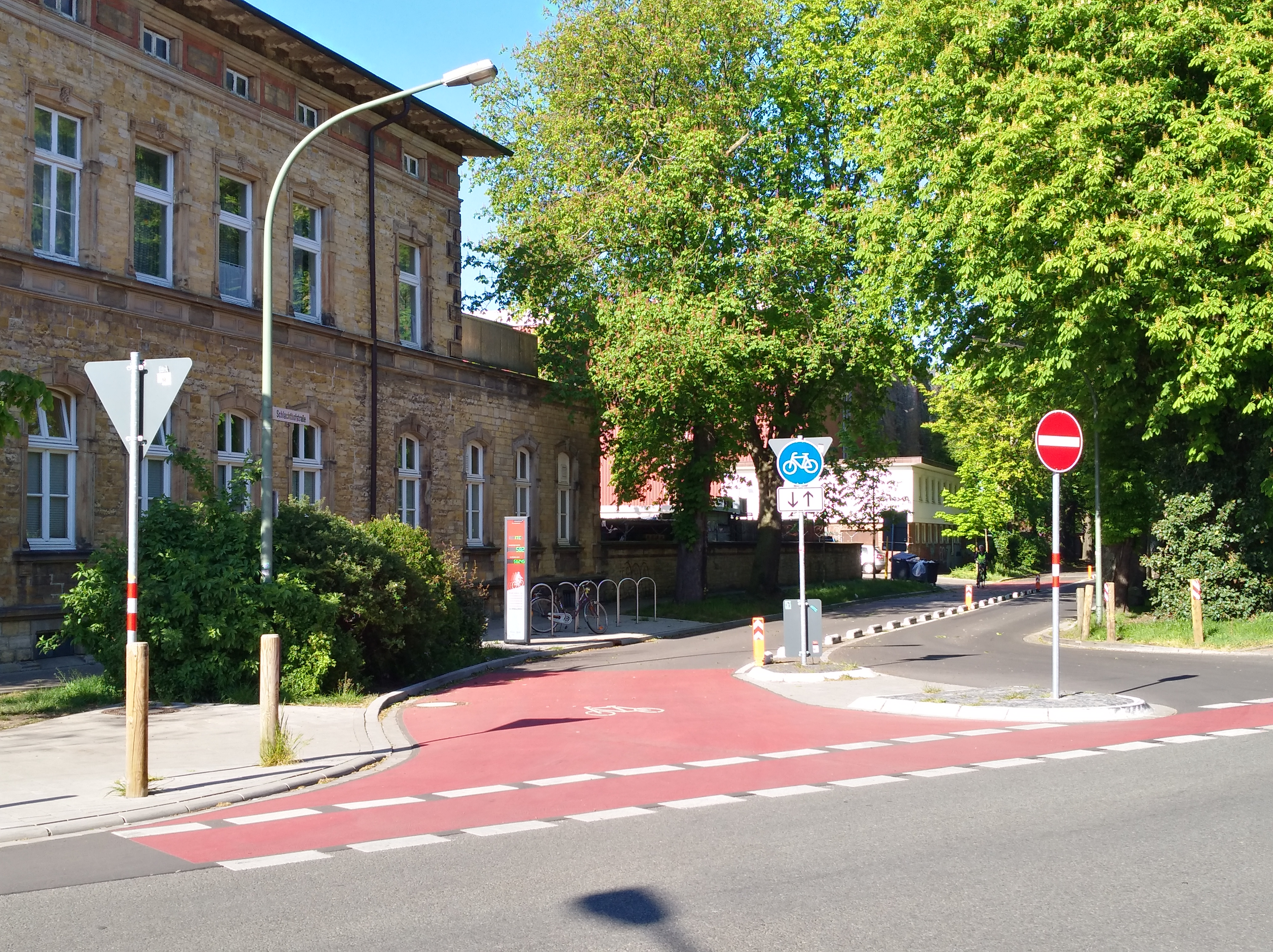 Beginn des Radschnellwegs Osnabrück – Belm an der Liebigstraße, Ecke Schlachthofstraße, in Osnabrück